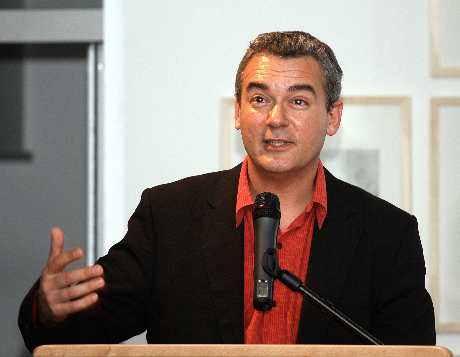 Schriftsteller Ilija Trojanow bei einer Lesung anlässlich der Verleihung des Preises der Literaturhäuser in Köln